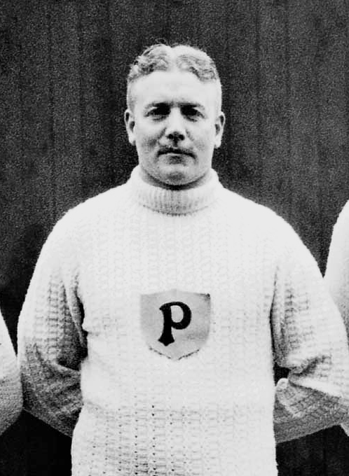 Erik Algot Fredriksson, 1912 Olympics